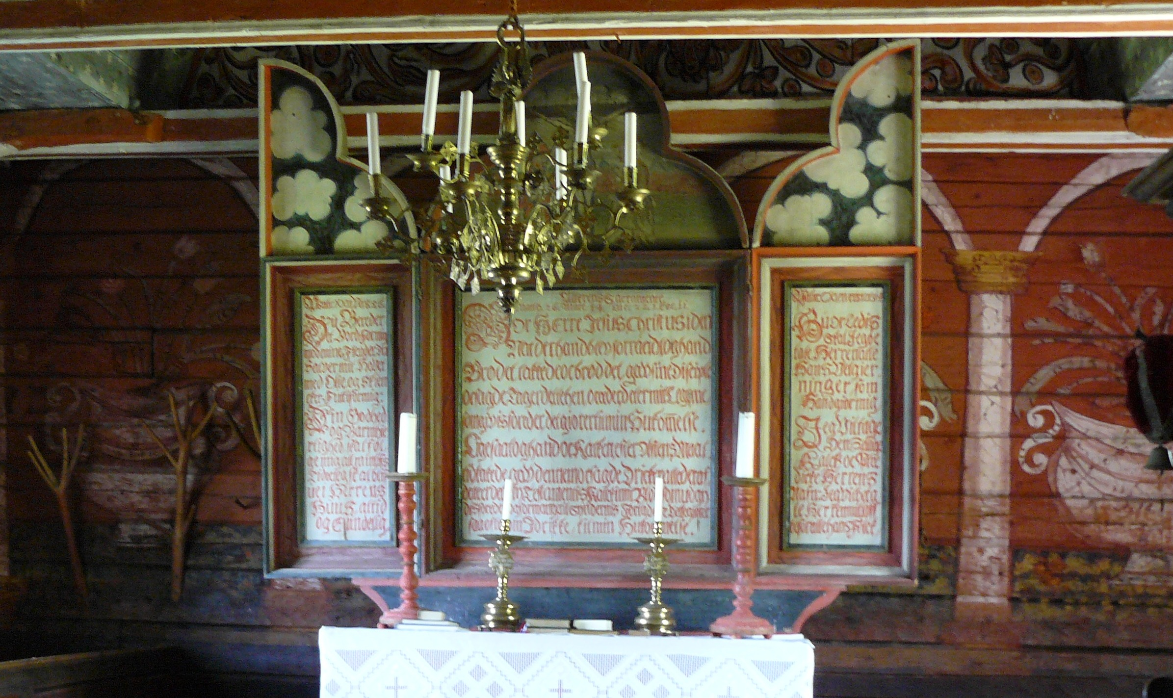 Gimmestad old churchs altarpiece.jpg Katekismetavle